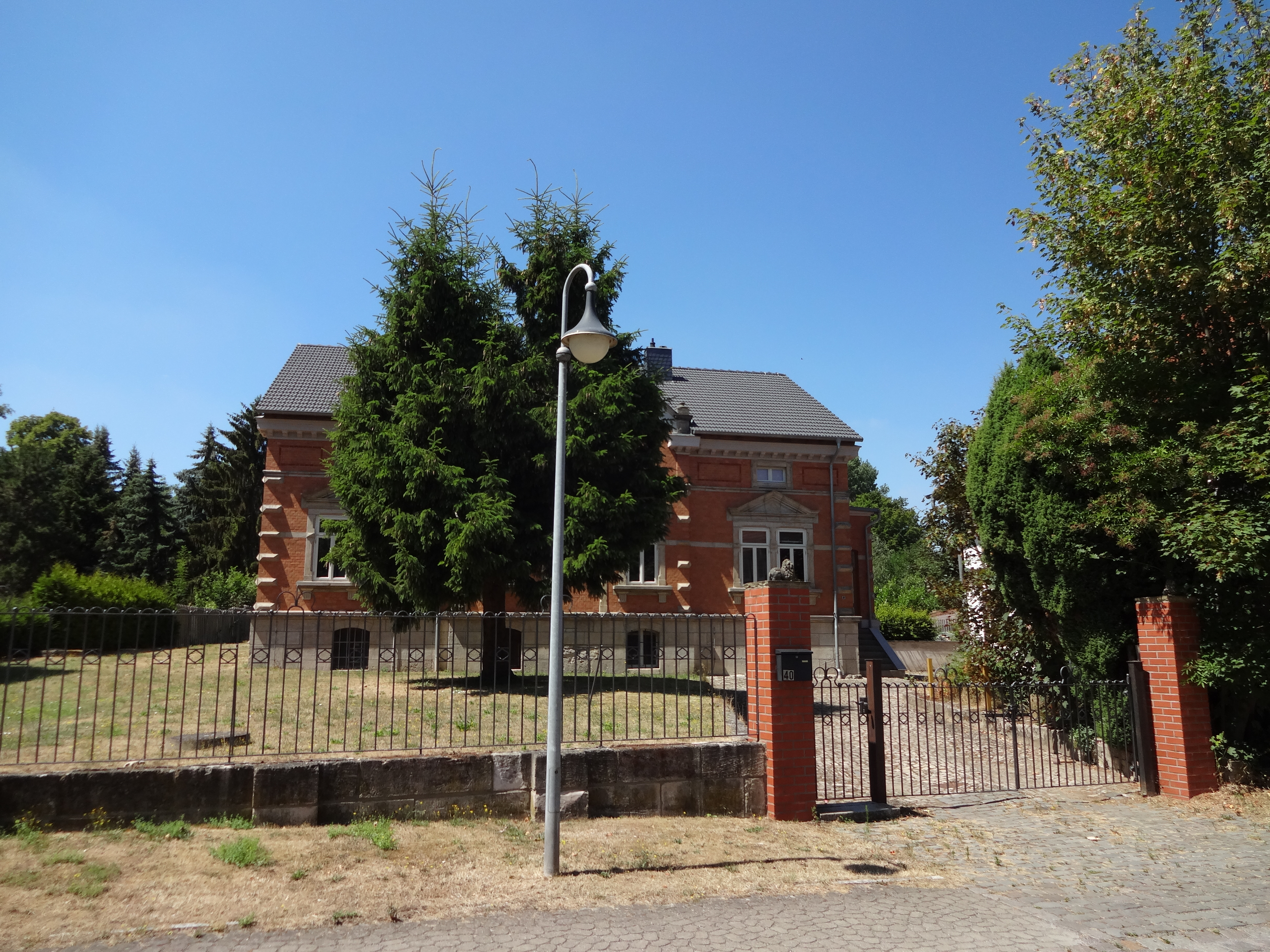 denkmalgeschützte Villa in der Hauptstraße 40 in Vogelsdorf (Gemeinde Huy)